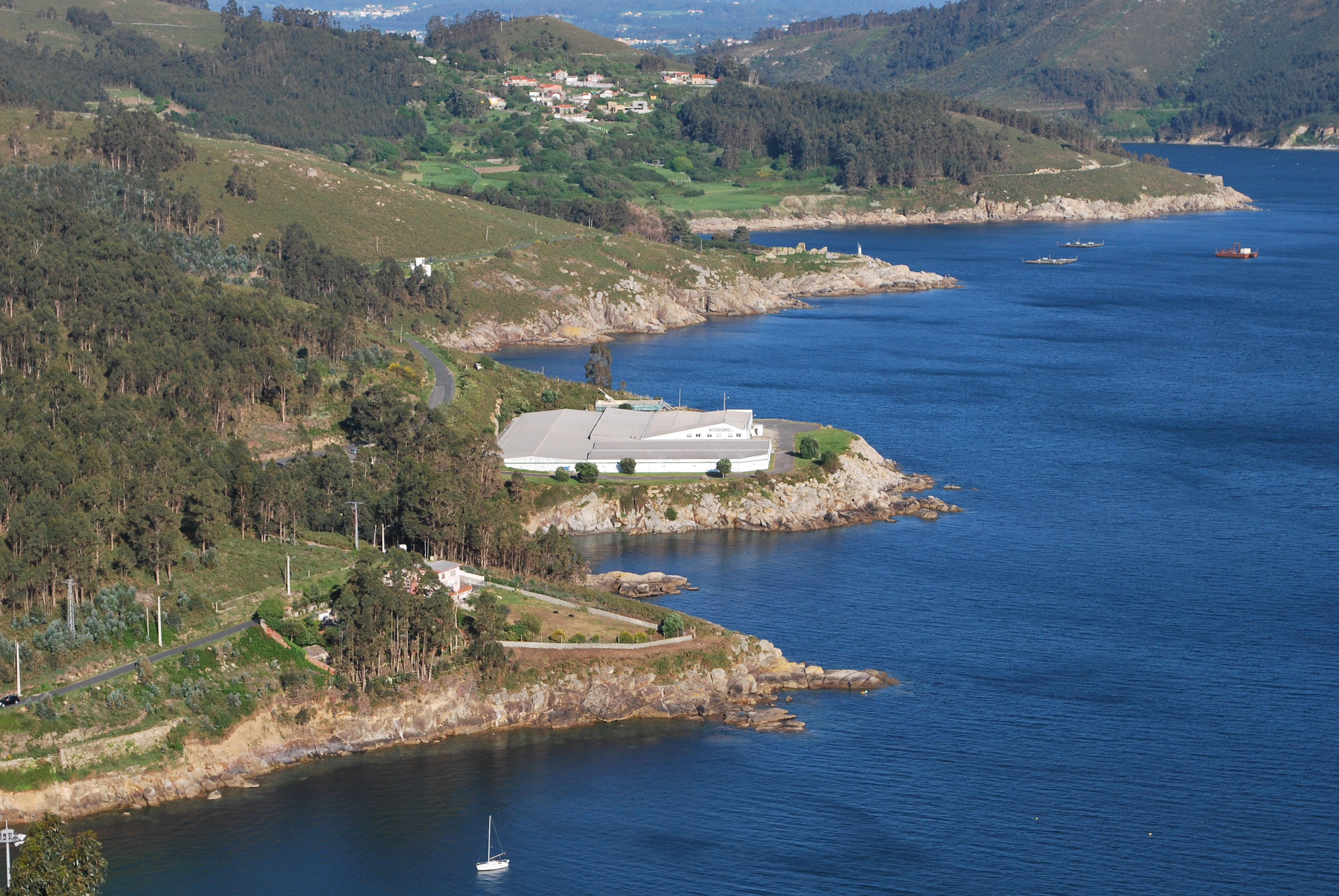 Piscifactoría e bateas de marisco na entrada da ría de Ferrol